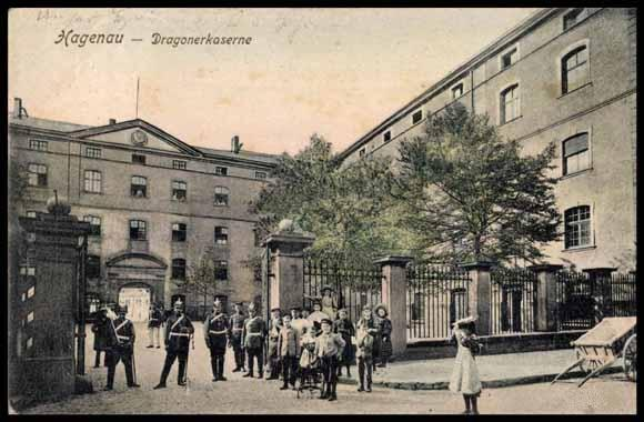 Dragoner-Kaserne in Hagenau/Lothringen, genutzt nach 1871 vom 3. Schlesischen Dragoner-Regiment Nr. 15